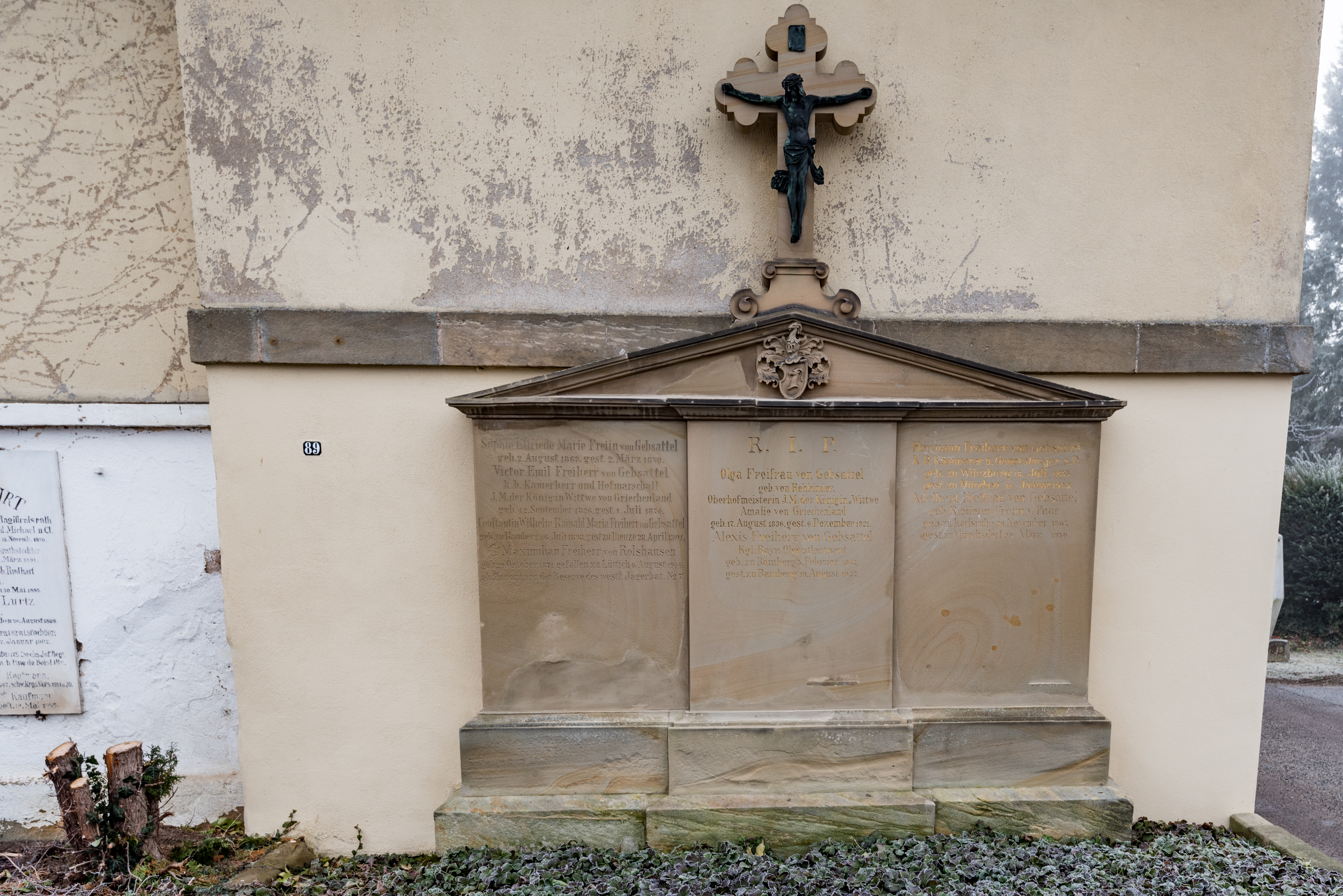 Bamberg, Gundelsheimer Straße 13, Hauptfriedhof, Grabmal